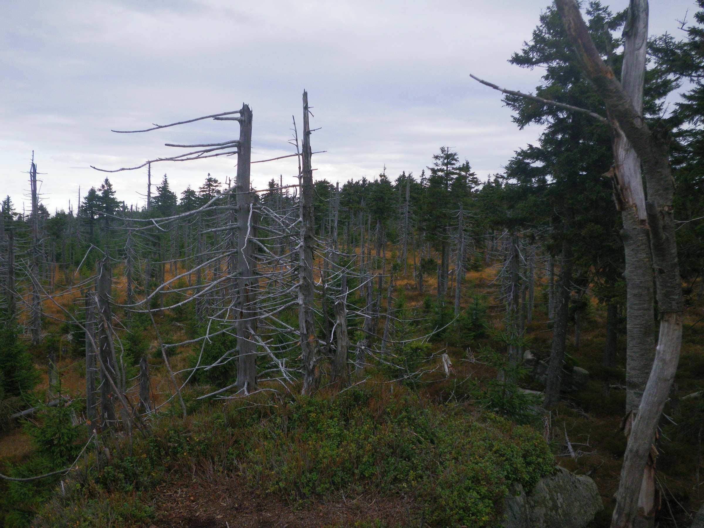 výhled v blízkosti Černých jezer